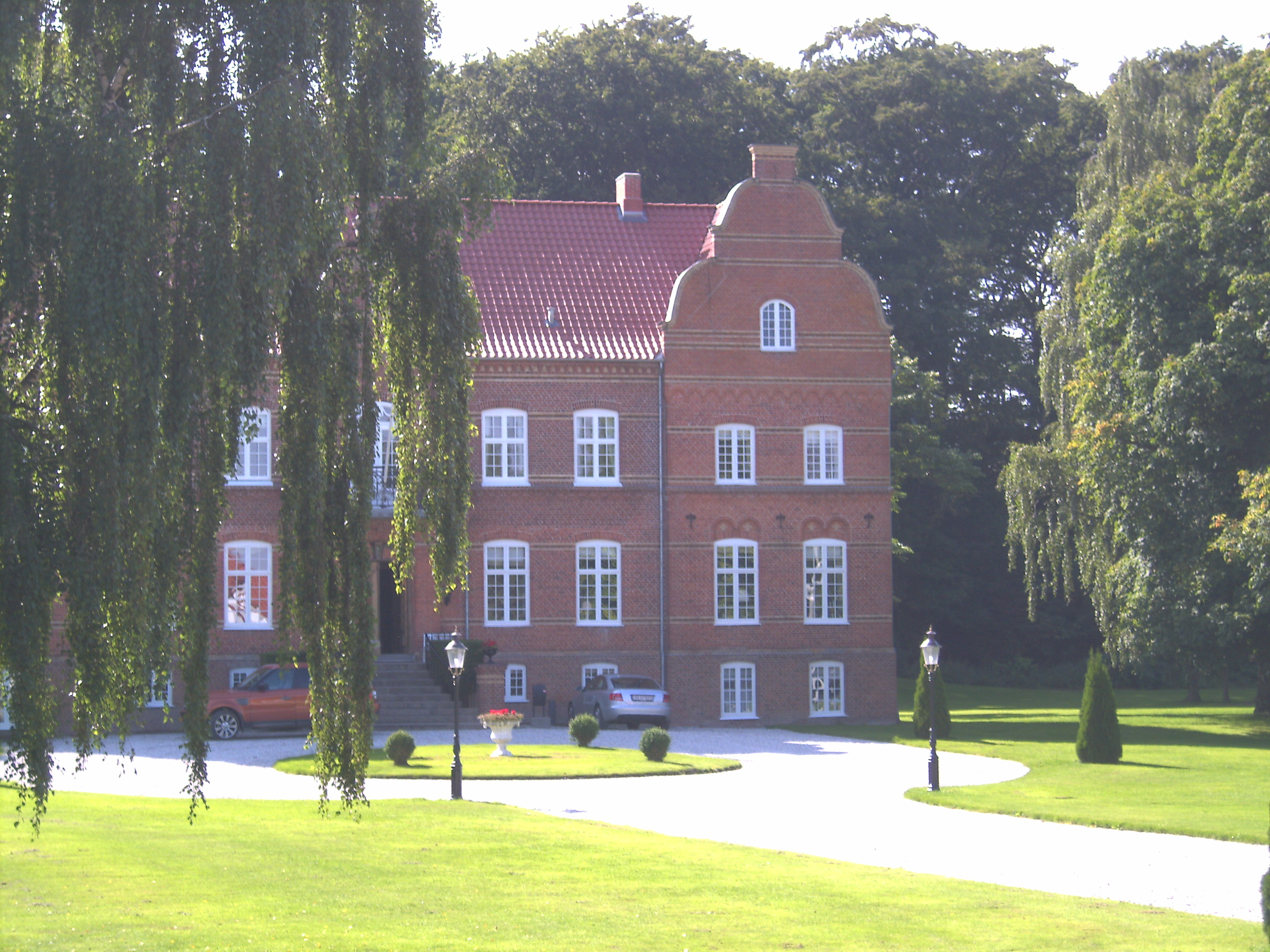 Estruplund, Estruplund sogn,Rougsø Kommune